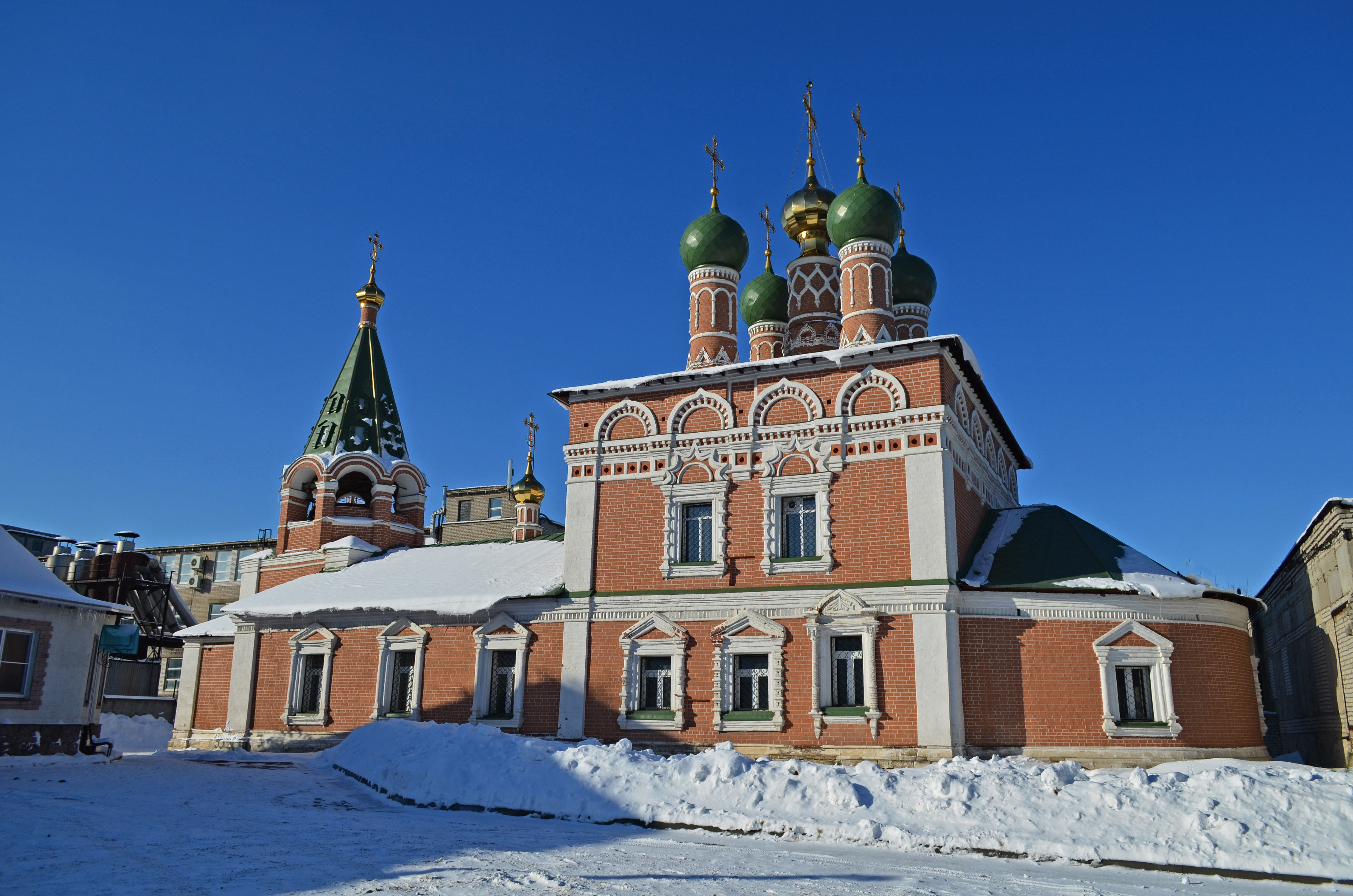 Церковь Входа Господня в Иерусалим: улица Скоморошинская, 6 (Старый базар), Рязань, Рязанская область